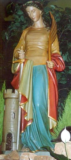 Helleg Barbara